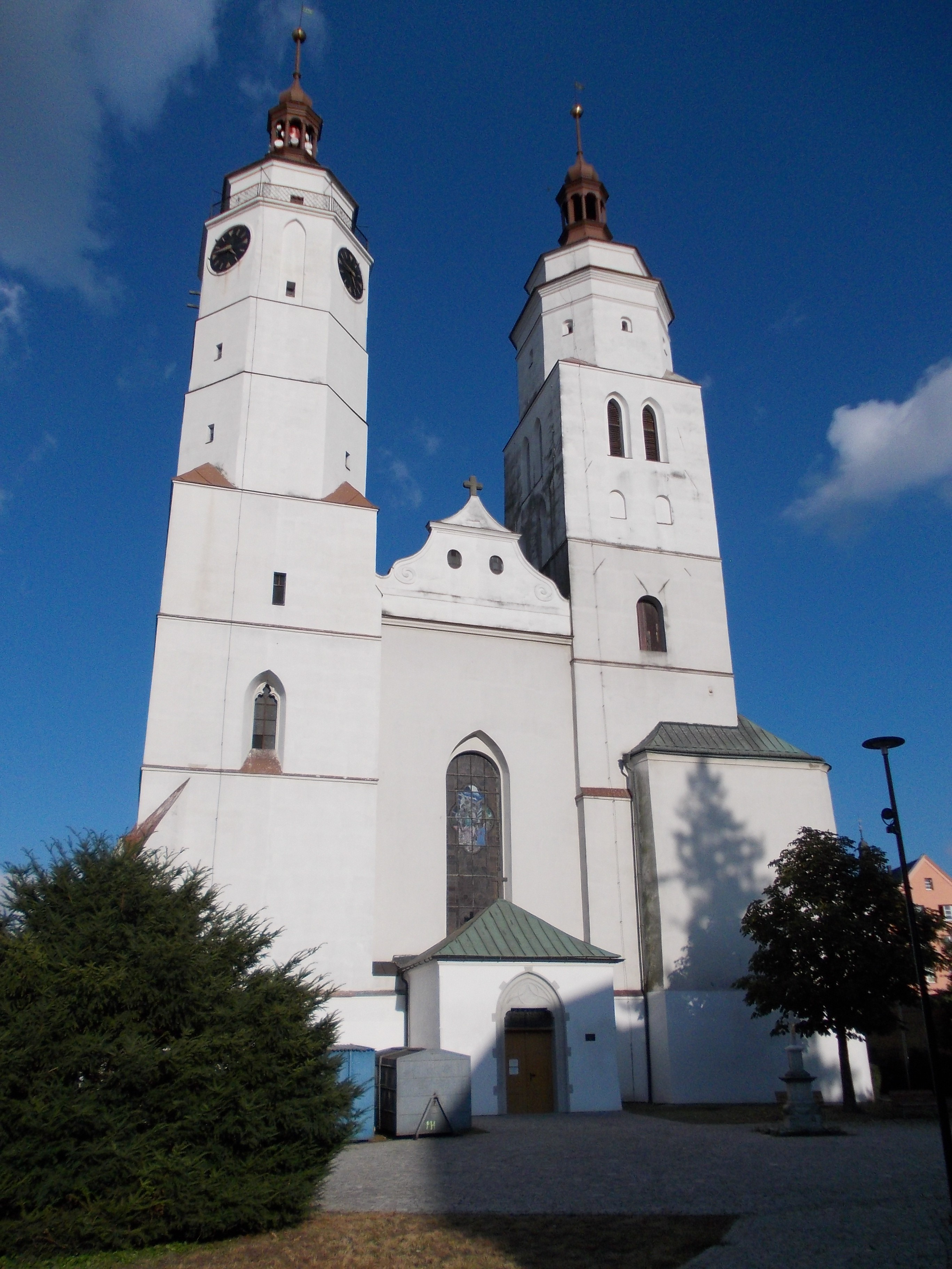 Kostel svatého Martina, náměstí Osvobození, parc. 37, 40, Krnov-střed, Krnov.